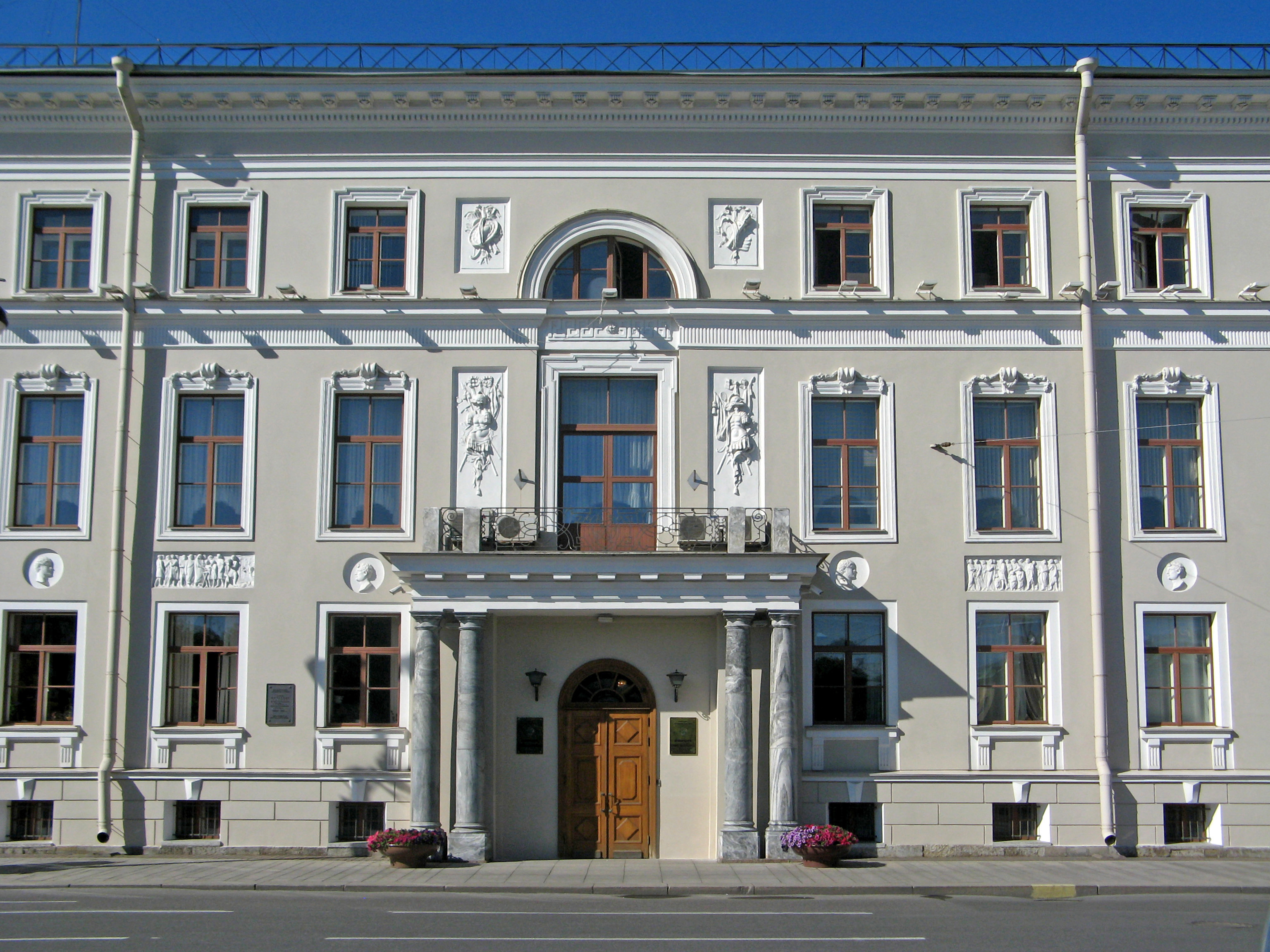 Дом Мятлевых: Исаакиевская площадь, 9, Почтамтская улица, 2, Адмиралтейский район, Санкт-Петербург